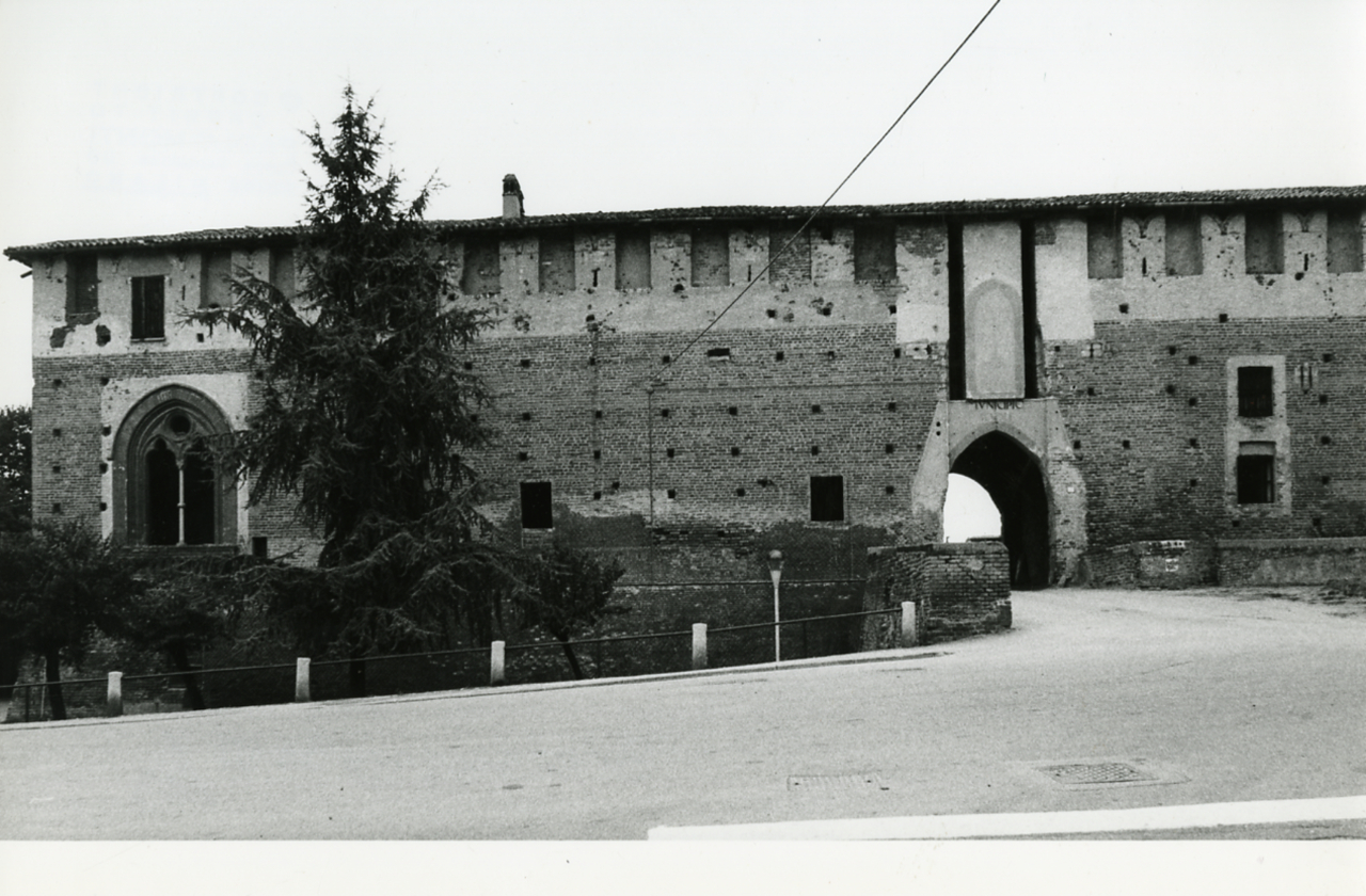 Servizio fotografico : Bereguardo, 1980 / Paolo Monti. - Stampe: 3 : Positivo b/n, gelatina bromuro d'argento/ carta, 18x24, 24x30. - ((Al verso delle stampe manoscritti i numeri dei negativi corrispondenti (formato 35 mm) con indicazione del fotogramma: 3551/23, 3551/27, 3551/30. - Timbro a inchiostro con copyright: "© Copyright/ Credit to/ Paolo Monti/ Corso Sempione [...]/ Milano". - Sul coperchio della scatola iscrizione didascalica manoscritta a pennarello nero: ""Castelli/ Architettura". - Occasione: Documentazione per la pubblicazione: Vincenti Antonello, "Castelli viscontei e sforzeschi", Milano, Rusconi immagini, 1981. - Fonte: Agenda di Paolo Monti: Nikon Leika 3001-/ Monti 1978 (1978-1982), presso Archivio Paolo Monti. - Fonte: Monografia di Vincenti, Antonello: Castelli viscontei e sforzeschi, Milano, Rusconi immagini (1981)